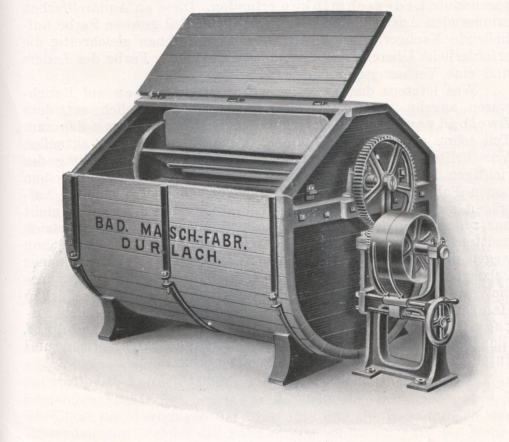 H. Werner, Gera: Das Färben der Rauchwaren. Treibhaspel als Pelzfärbereimaschine mit Klappdeckel.